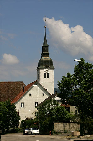 Kirche in Brislach